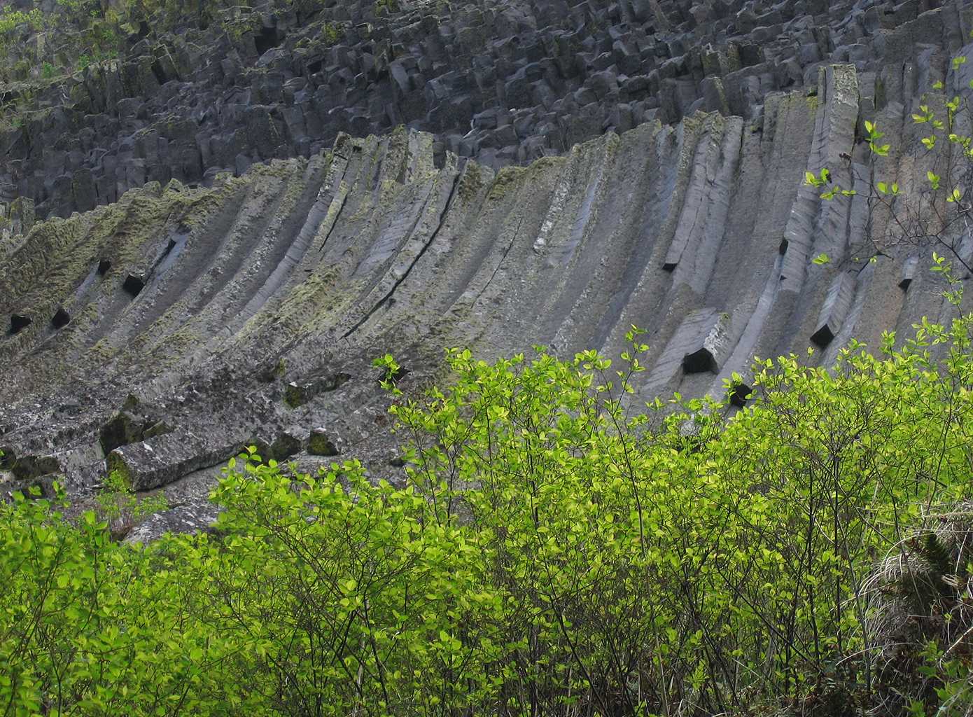 Metaliferi mountains Romania basalt columns